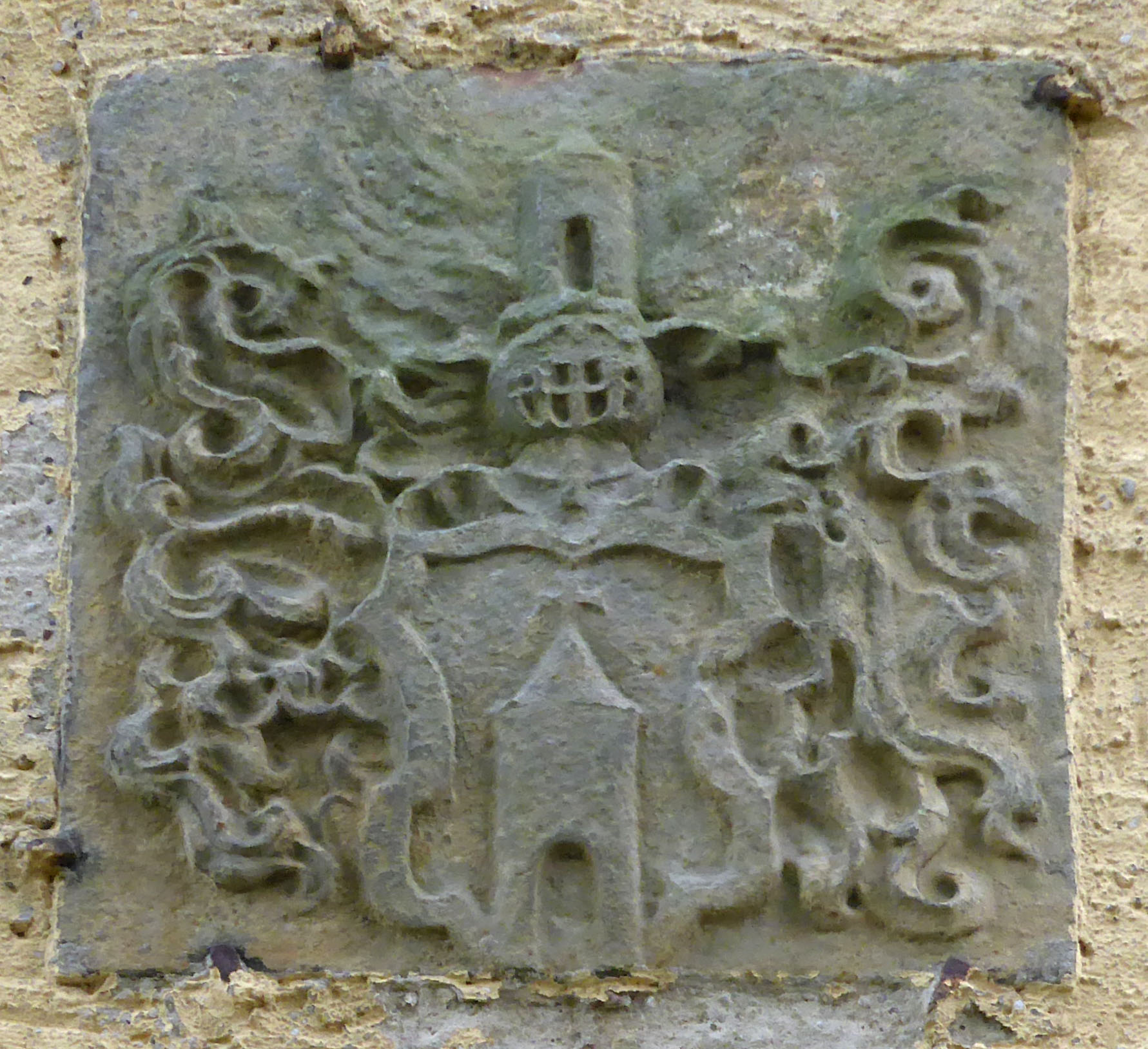 Detail an der St.-Georg-Kirche in Adlum